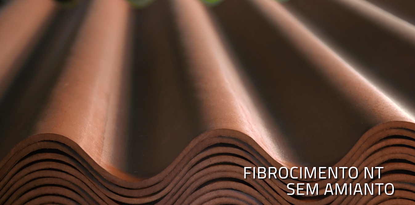 Fibrocimento NT